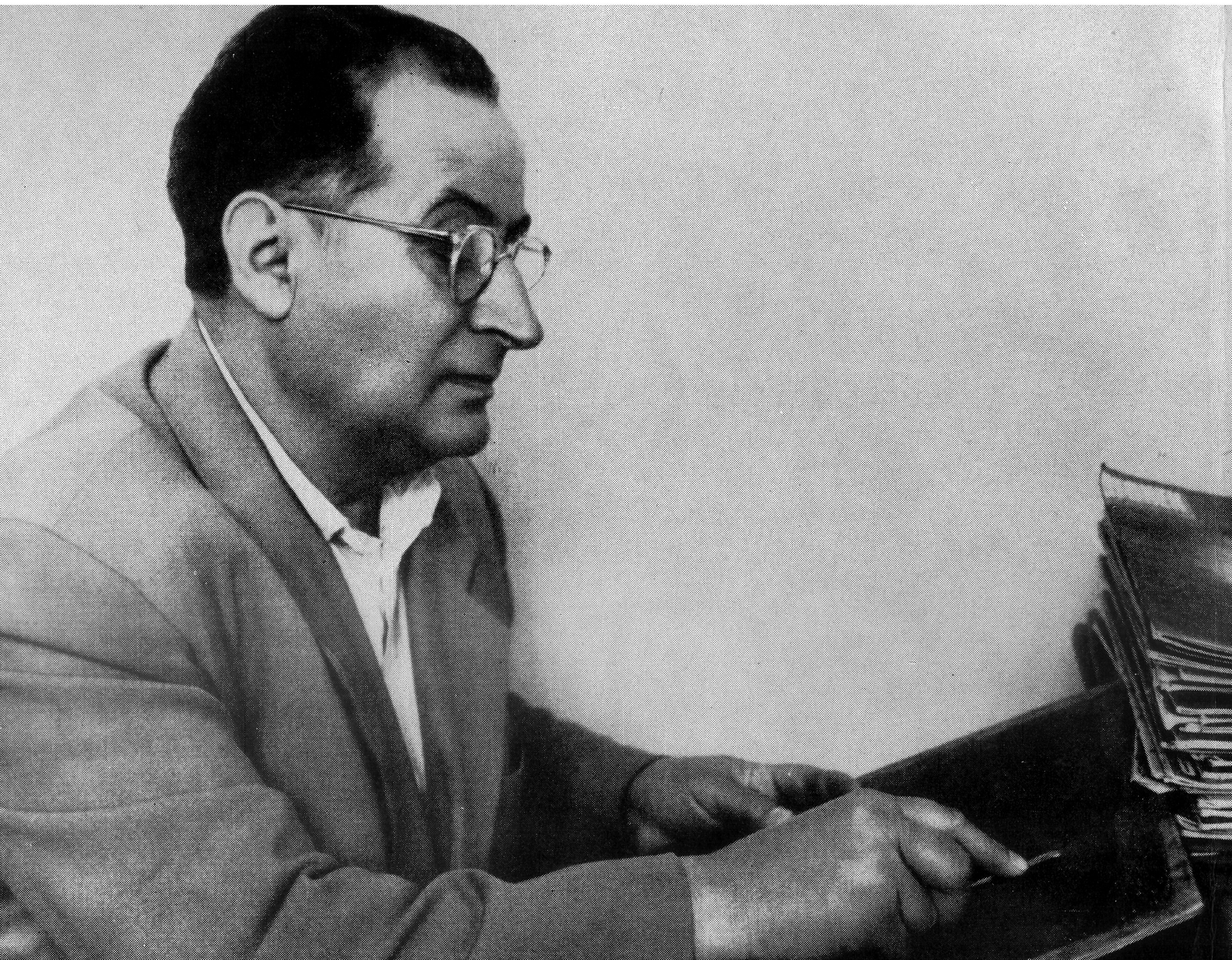 Алекпер Алескерович Рзакулиев